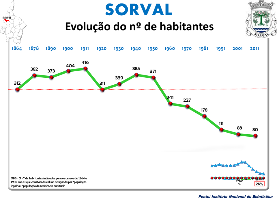 Censo 1864/2111